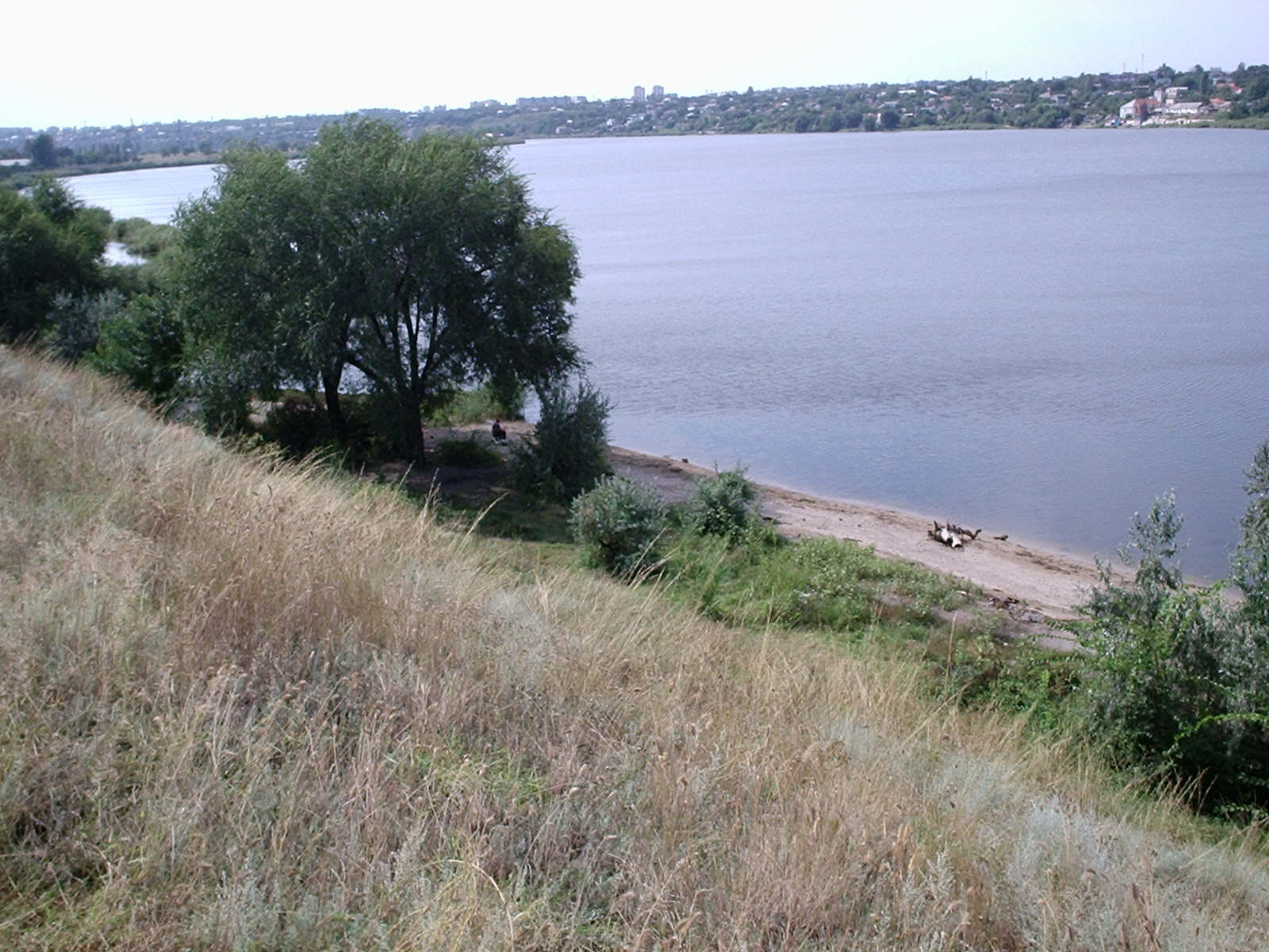 Вид с п-ова Аляуды на Ракетное Урочище